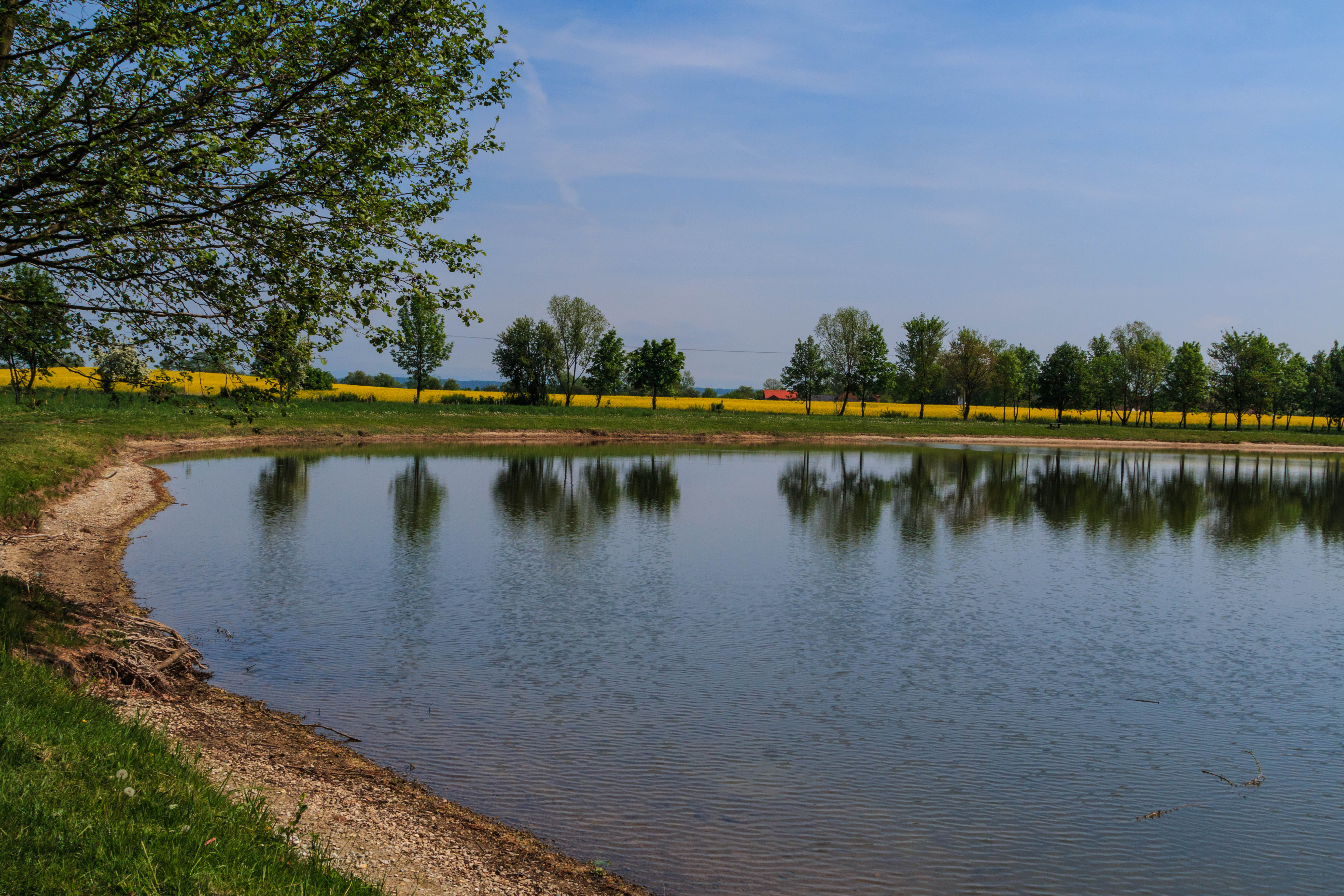 Duhová jezera u Moravan Project: Vodstvo.